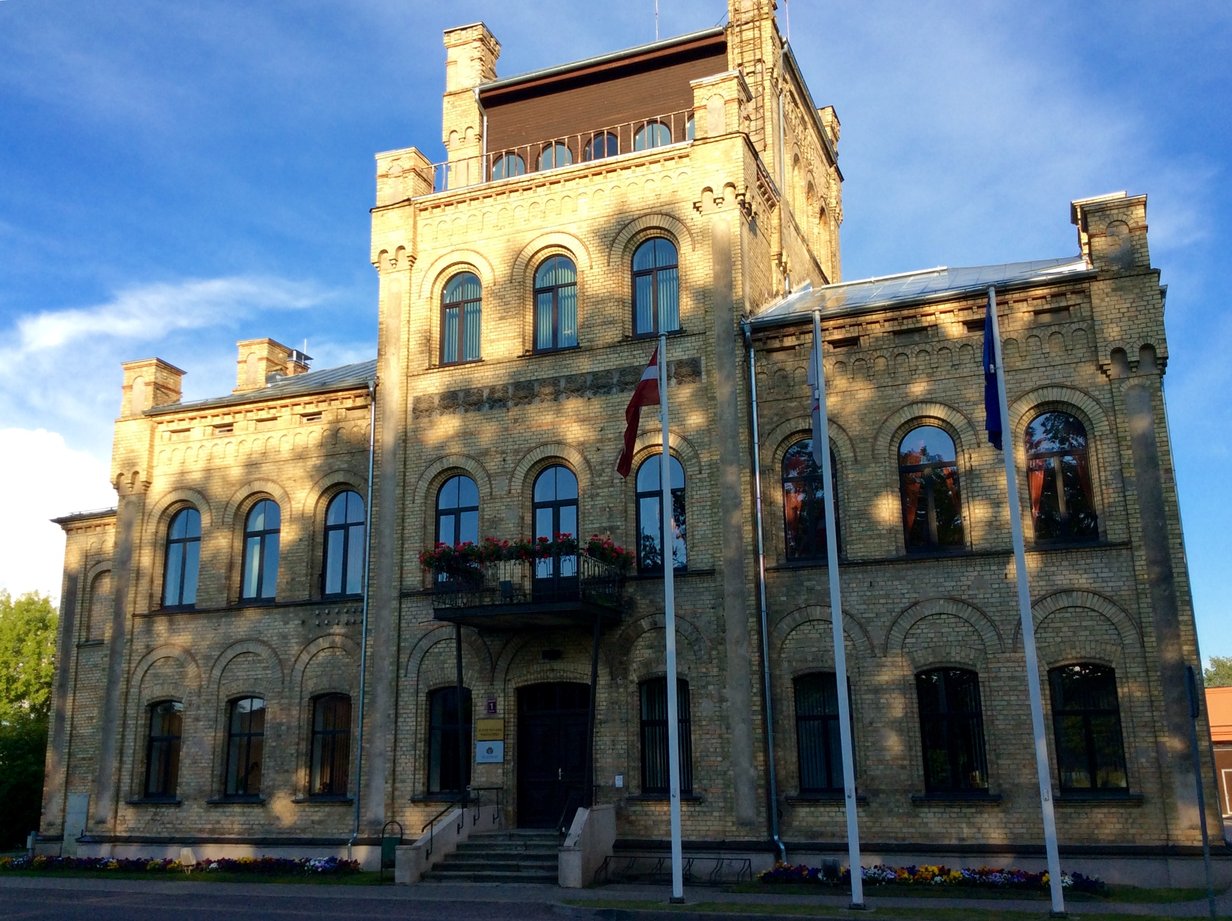 Здание администрации Ауцского края